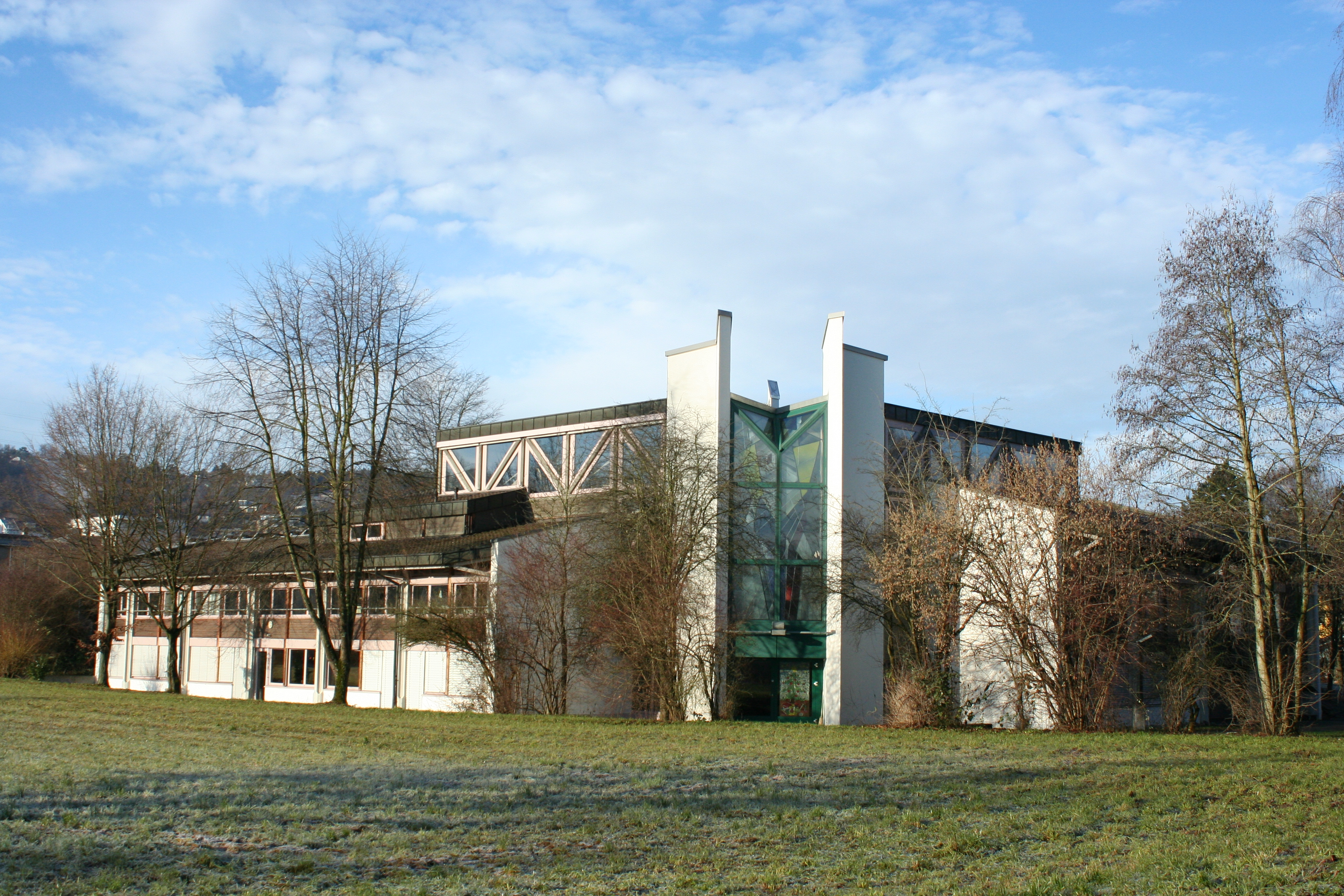 Römisch-katholische Kirche St. Katharina von Siena Fällanden, Aussenansicht von Osten